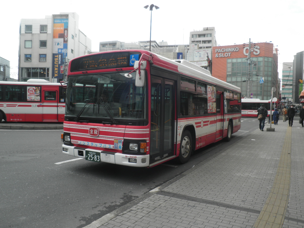 枚方高槻線